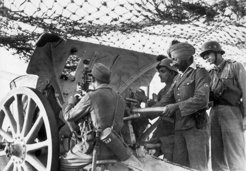 Soldaten der Legion "Freies Indien" Aus den in Europa lebenden Indern aller Stämme und Religionen hat sich eine indische Legion gebildet, die, der deutschen Wehrmacht angegliedert, entschlossen ist, auf europäischem Boden für die Befreiung ihrer Heimat von der verhassten britischen Zwangsherrschaft zu kämpfen.- Unser Bild zeigt: Indische Artilleristen beim Scharfschießen auf Seeziele. PK-Aufnahme Kriegsberichter Werner (Sch) 12.2.44 [Herausgabedatum]